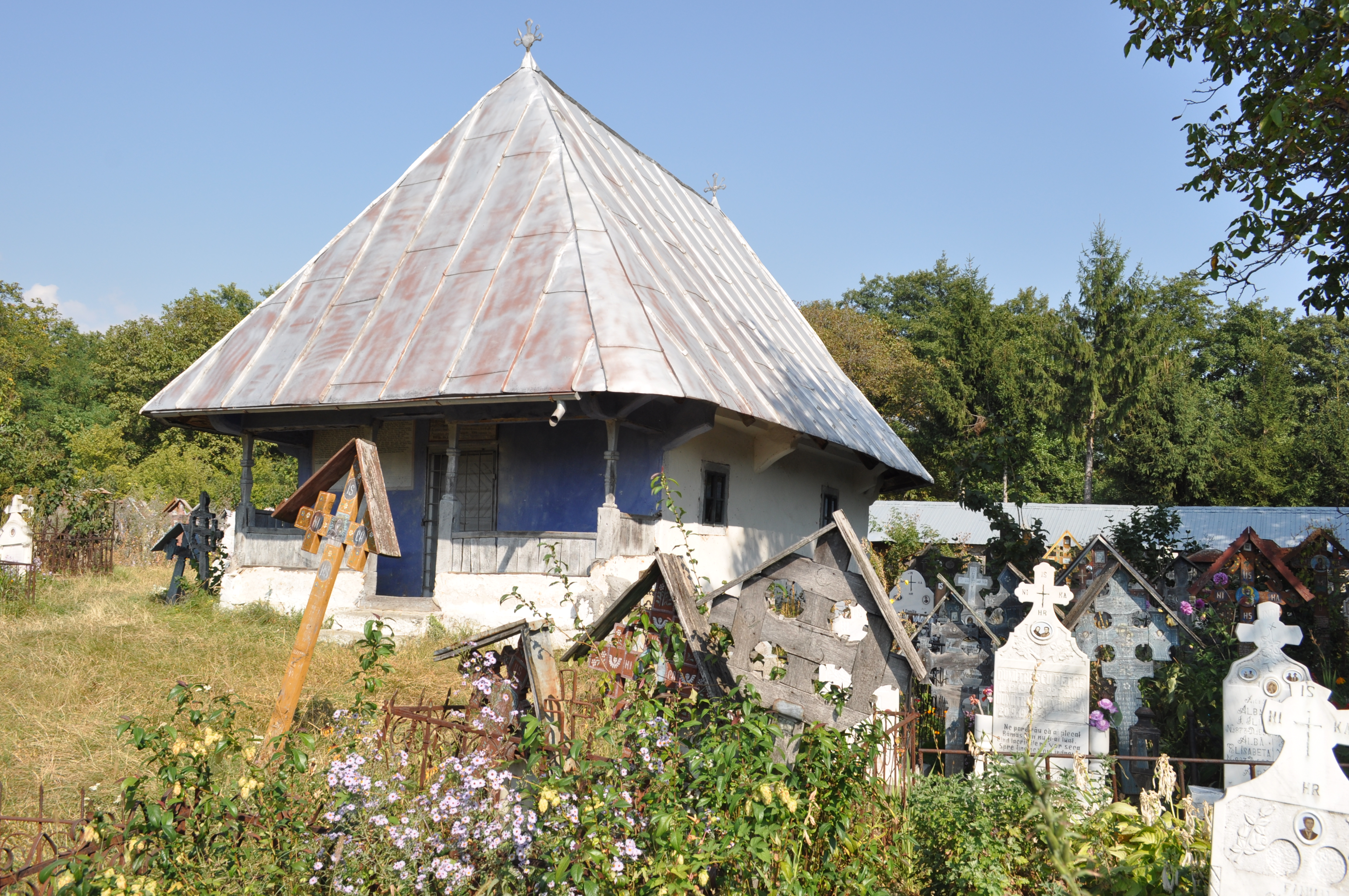 Biserica de lemn Intrarea în Biserică a Maicii Domnului din Cărpiniș, Gorj 01